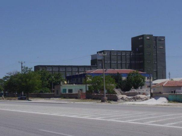 Tavşançalı Köyünde Bulunan Binnur.